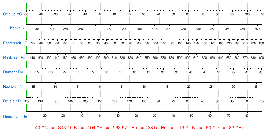 เปรียบเทียบ celcius, kelvin, farenheit, roemer